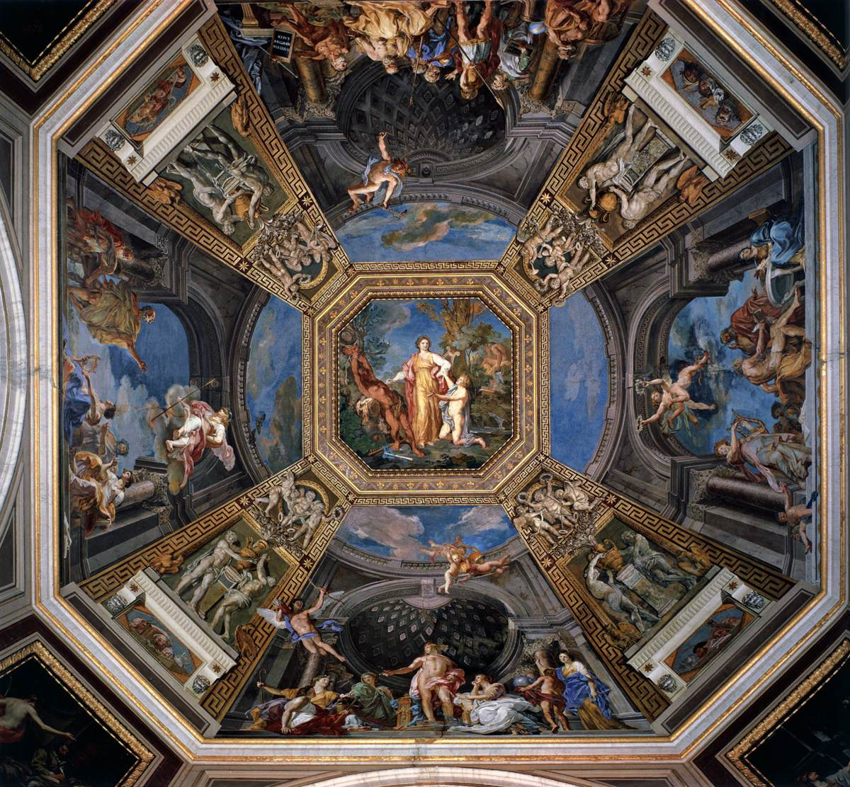 Tommaso Conca - Apollo con le Muse affresco 1782-87 Musei Vaticani, Roma